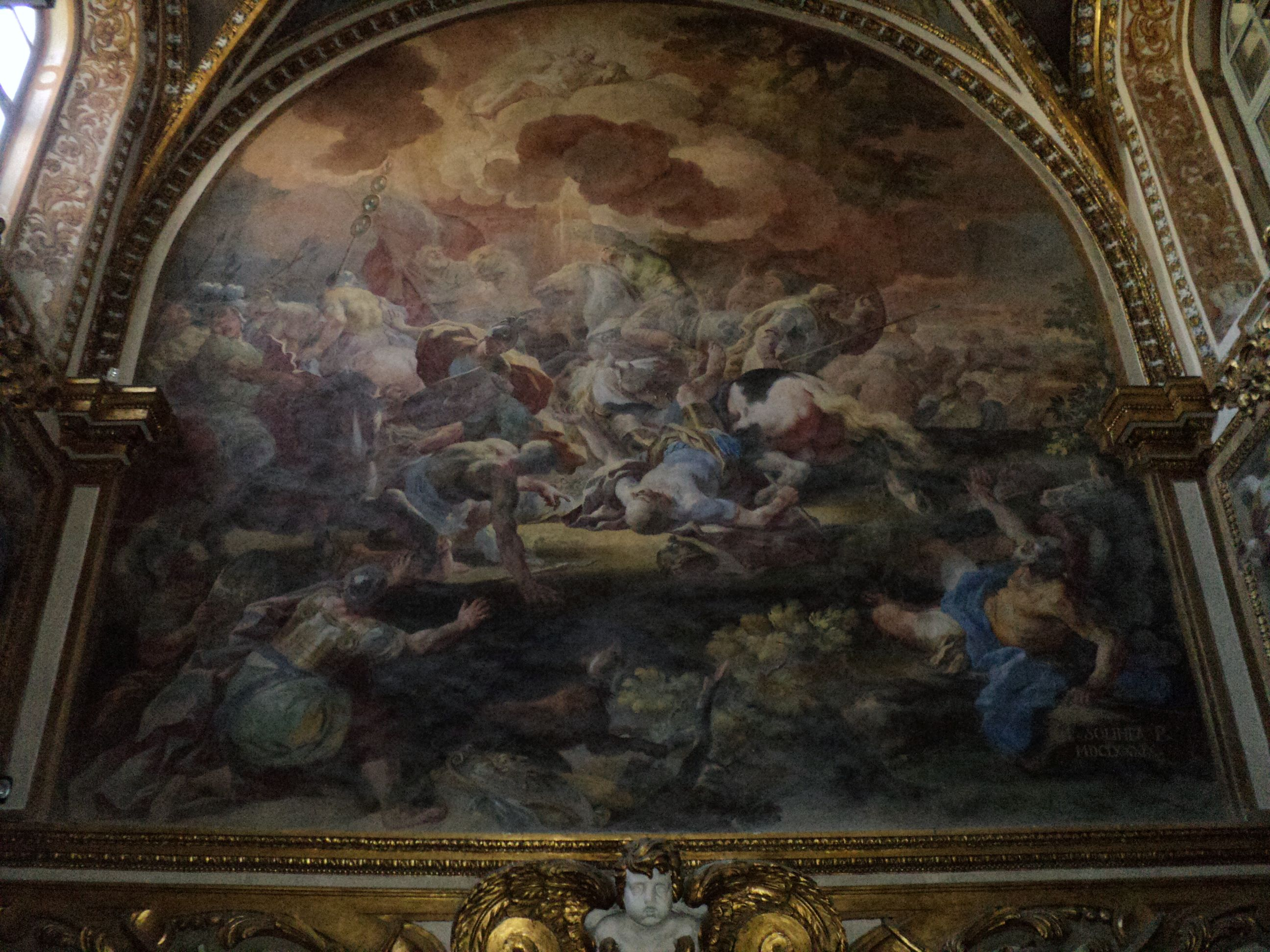 Basilica di San Paolo Maggiore (Napoli) - Sacrestia di Solimena